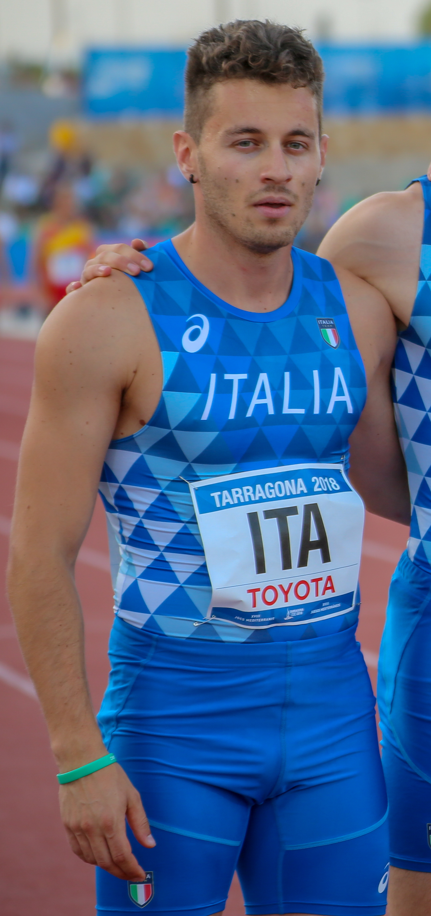 Federico Cattaneo en los relevos 4x100 en los Juegos del Mediterráneo 2018